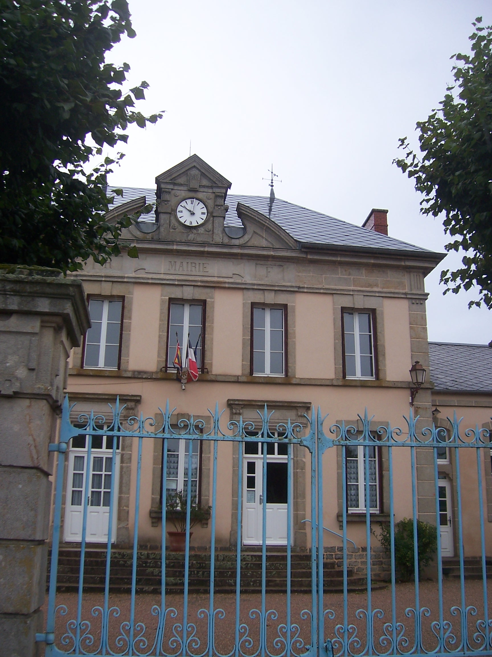 Mairie de Saint-Gervais-sur-Couches